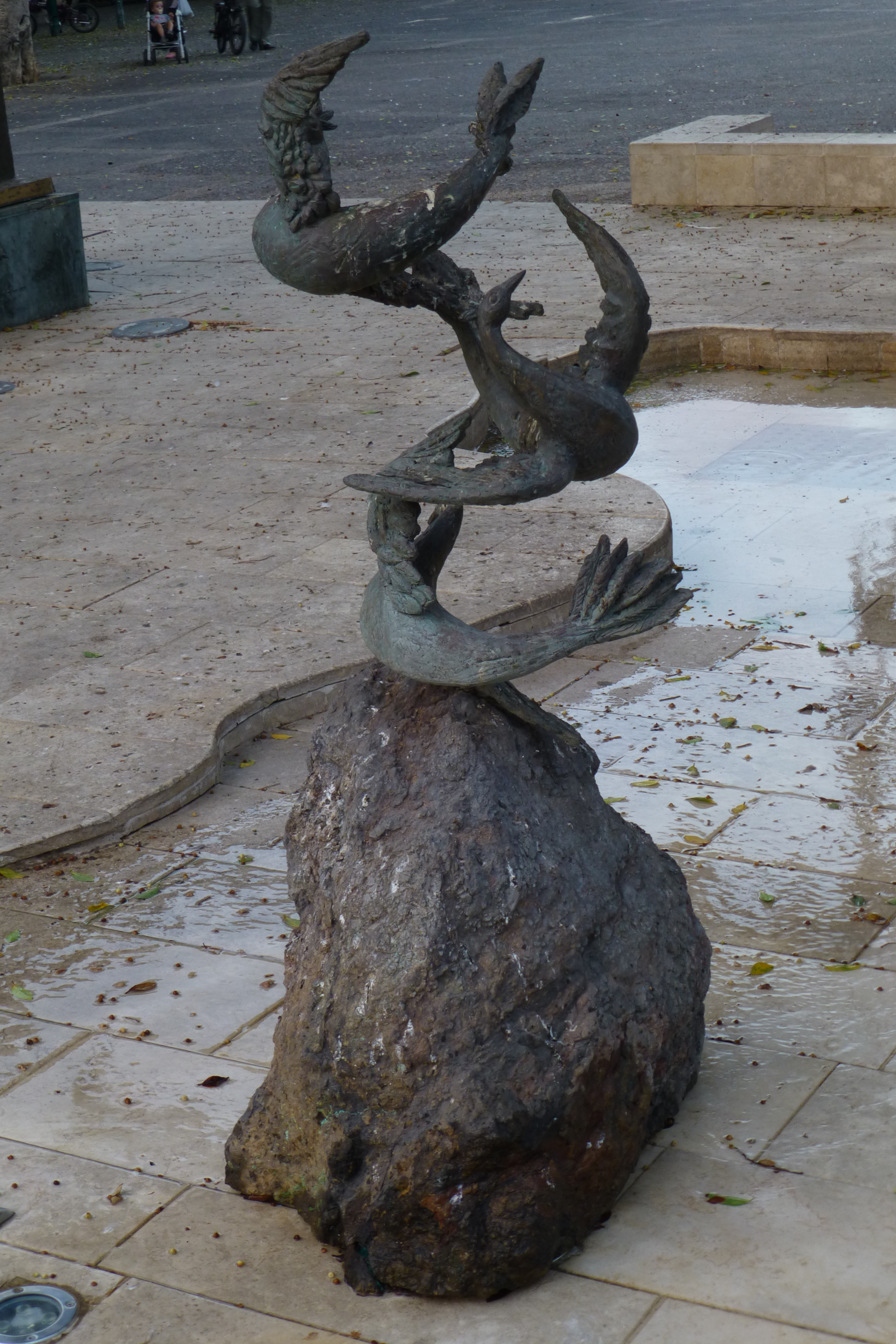 קולנוע אורדע - מבנה בסגנון הבינלאומי בו נפתח בית הקולנוע הראשון ברמת גן. בנייתו החלה ב-1936 ובאפריל 1937 פתח את שעריו. תכולתו עמדה על כ-800 מושבים ונערכו בו גם מופעים. ב-1990 חדל לשמש כבית קולנוע וכיום שוכן במבנה סניף של סופרפארם.